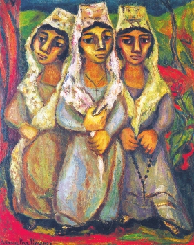 “Hiru manolak”, 1950, Paz Jimenez